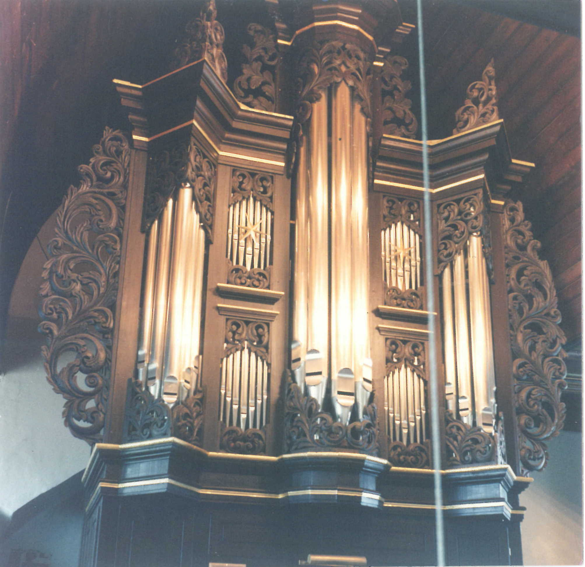 Orgel in Oldendorf, Landkreis Stade, St. Martin